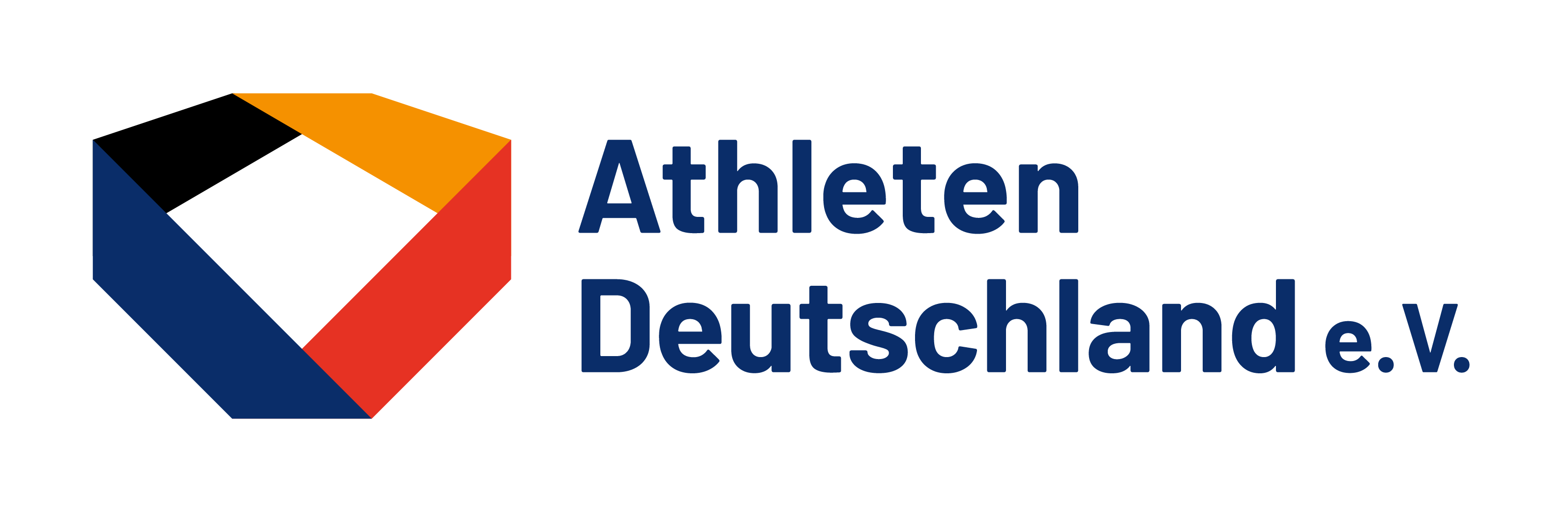 Athleten Deutschland ist ein Verein, der sich für die Rechte von Spitzensportler*innen einsetzt.